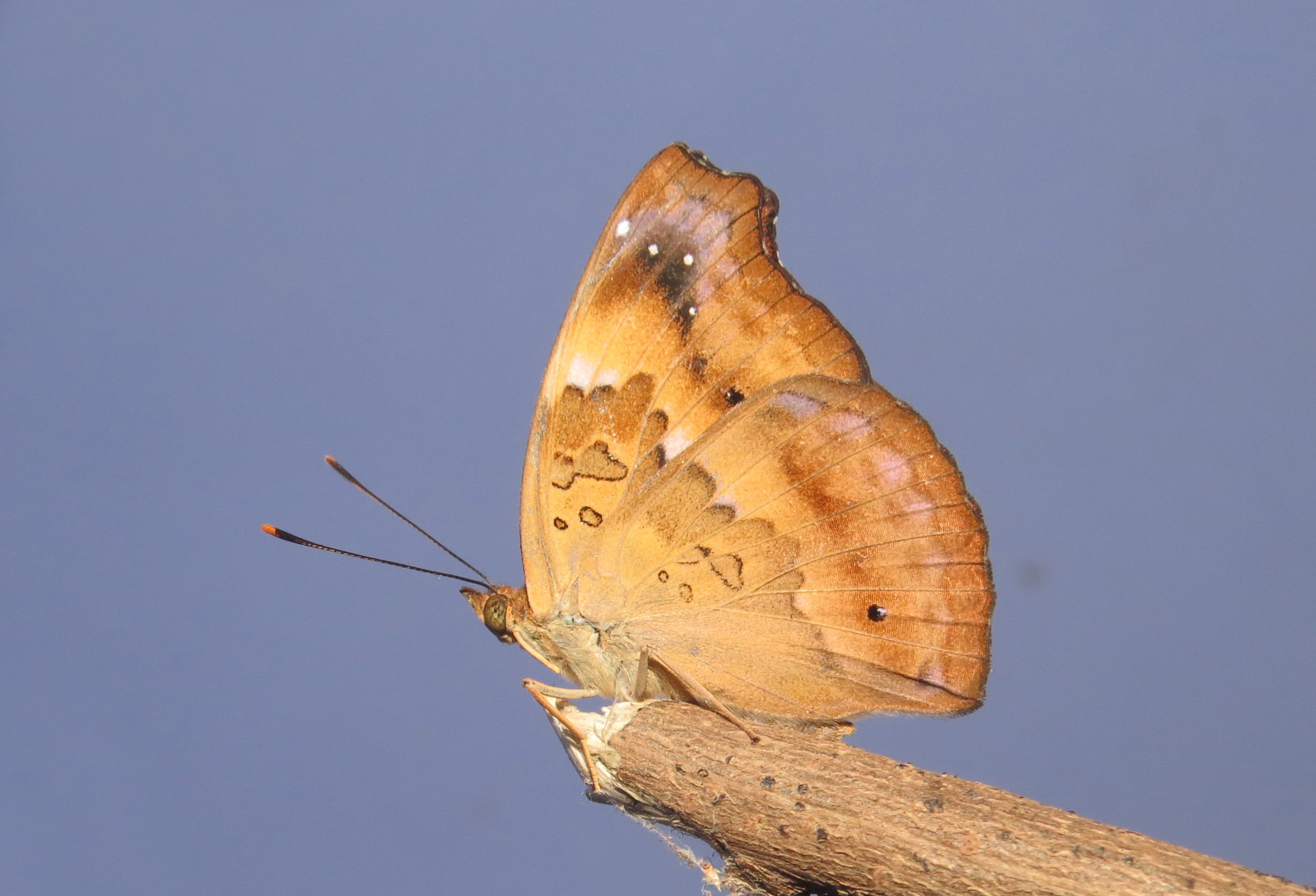 Rohana parisatis Westwood, 1850 – Black Prince at Periya, Wayanad